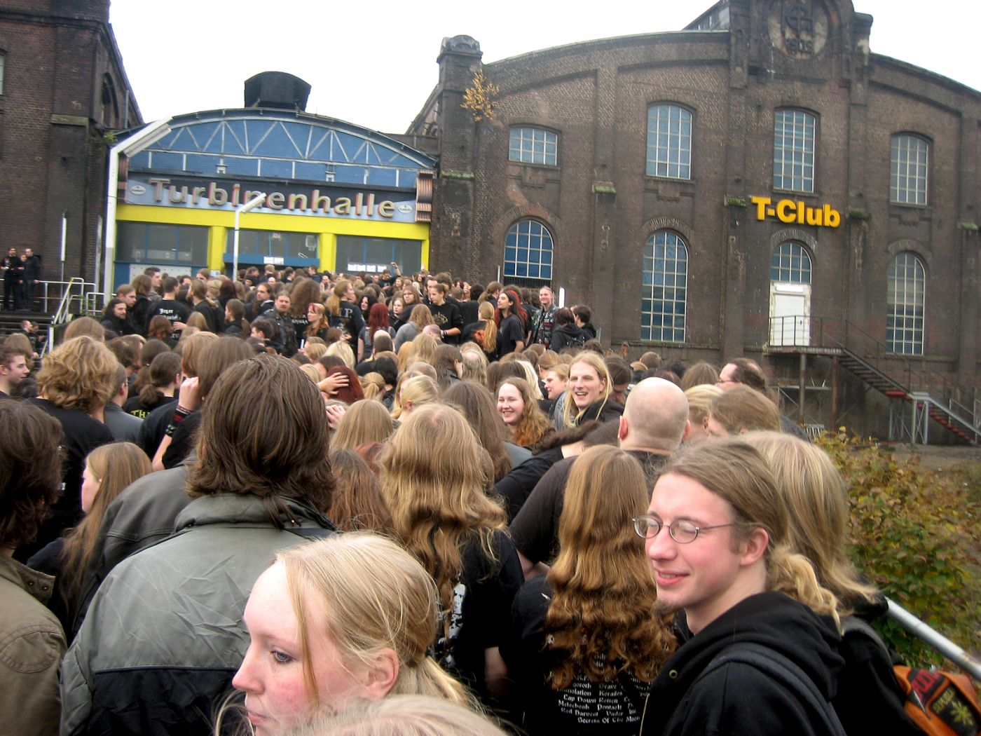 ultima ratio, Warteschlange, Turbinenhalle, oberhausen